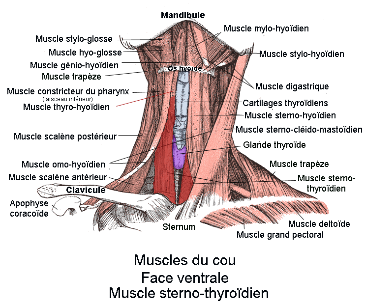 Muscle sterno-thyroïdien. Vue antérieure du cou.anatomie humaine